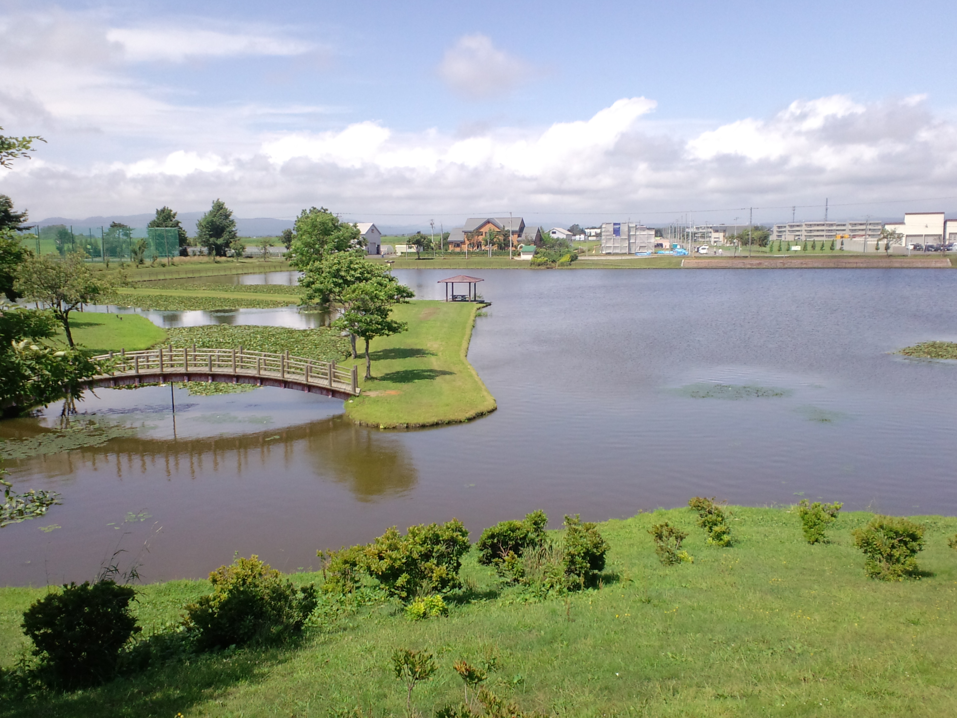 北村中央公園・トロッコ沼